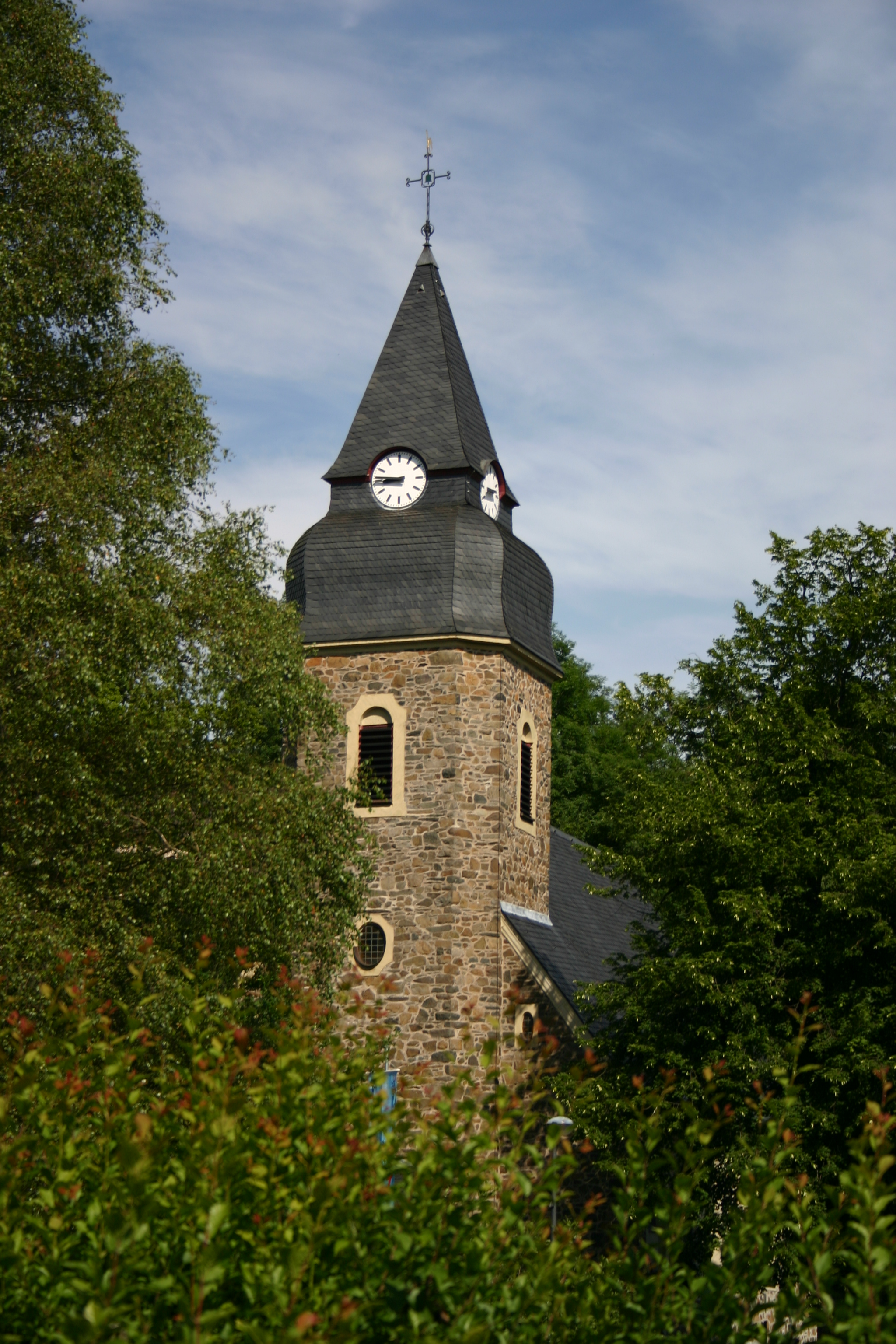 Pfarrkirche Sankt Antonius Wiemeringhausen